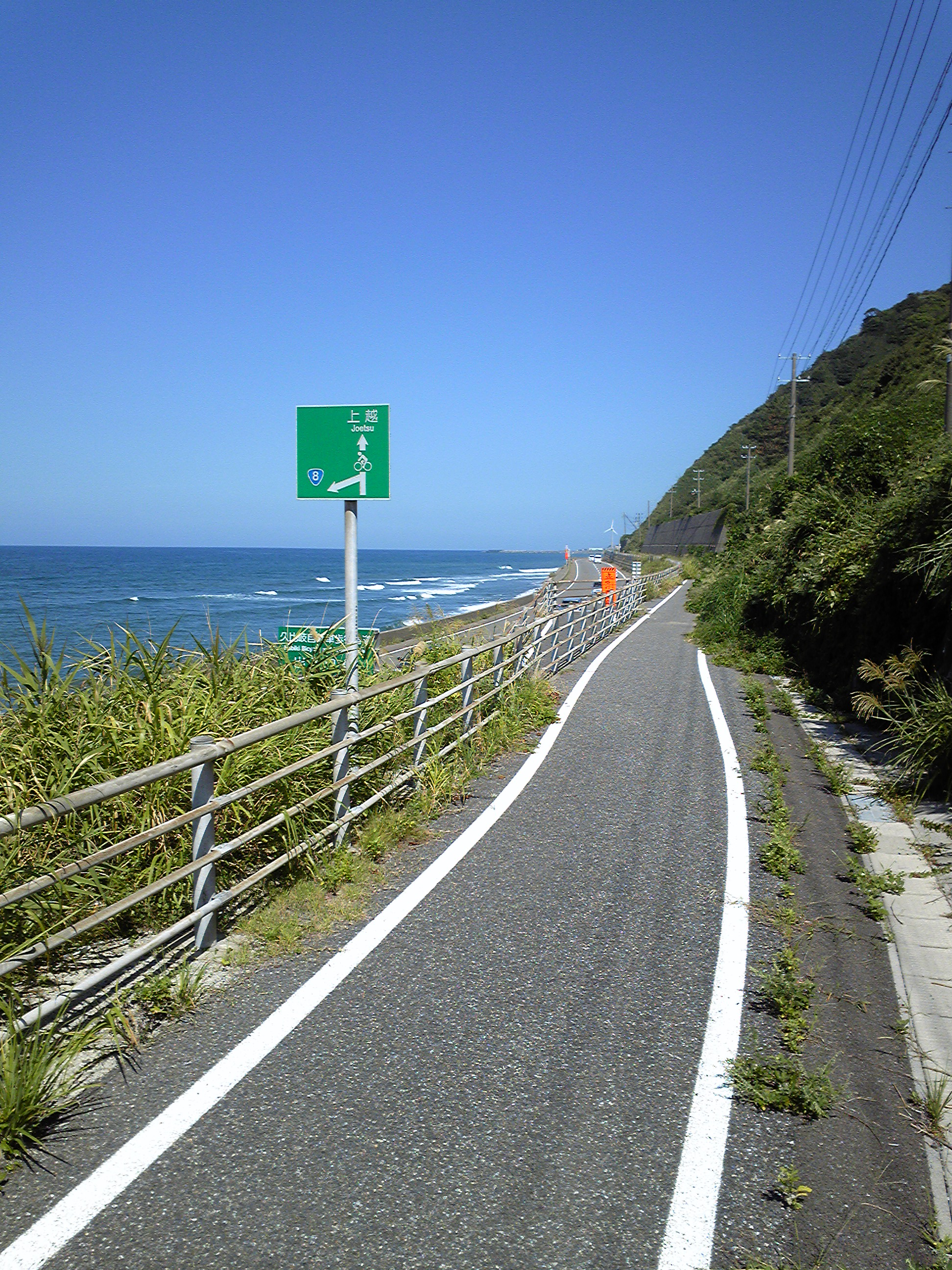 新潟県道542号上越糸魚川自転車道線（久比岐自転車道）。糸魚川市徳合。上越市境界付近より上越市方向。